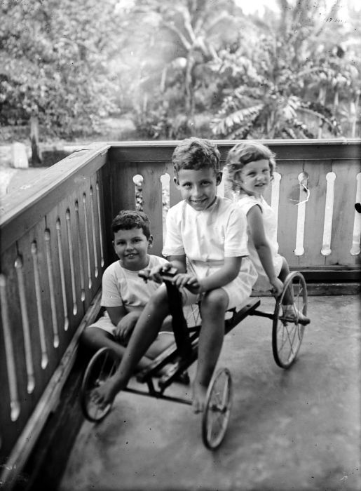 Negatief. Portret van drie Europese kinderen met een "Vliegende Hollander"